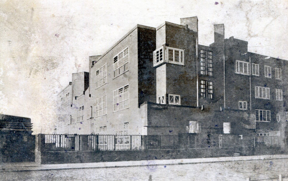 Hoofdwegschool Hoofdweg. Hoek Corantijnstraat. Amsterdam (West) P. W. 1924.